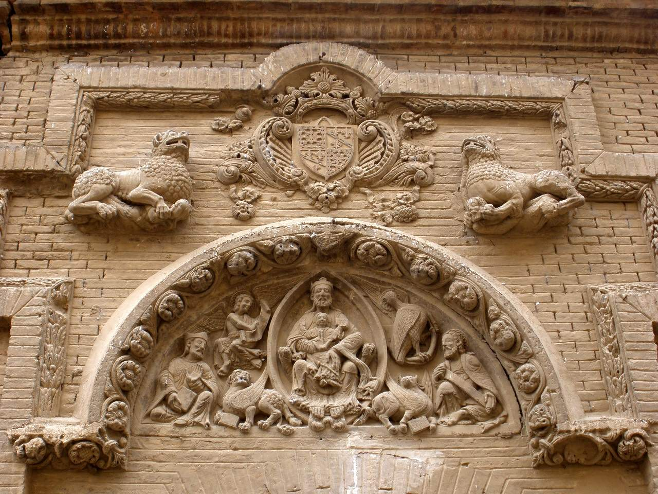 Portada de la Iglesia de San Nicolás de Bari (Tudela, Navarra).